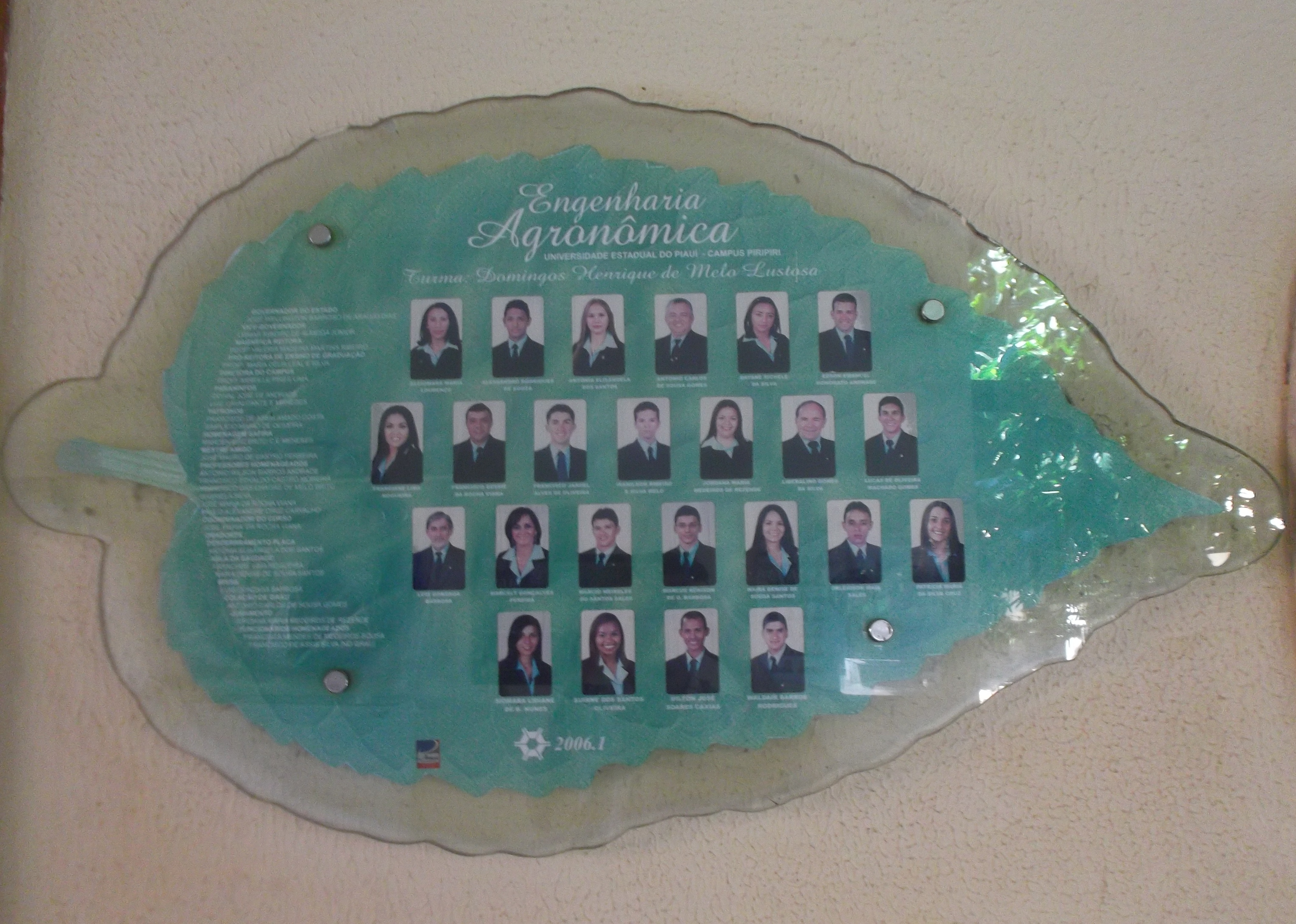 Placa de colação de grau em Engenharia Agronômica na Universidade Estadual do Piauí, Campus de Piripiri.